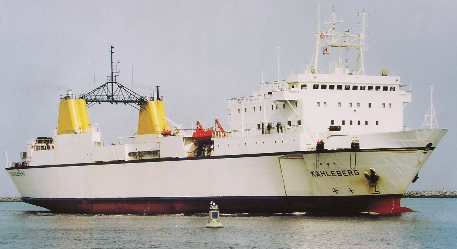 RoRo-Schiff Kahleberg gebaut in 1983